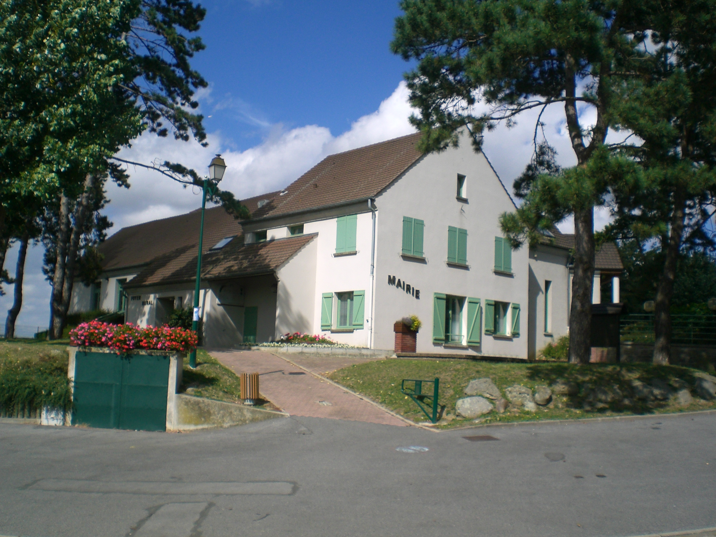 mairie de Génicourt